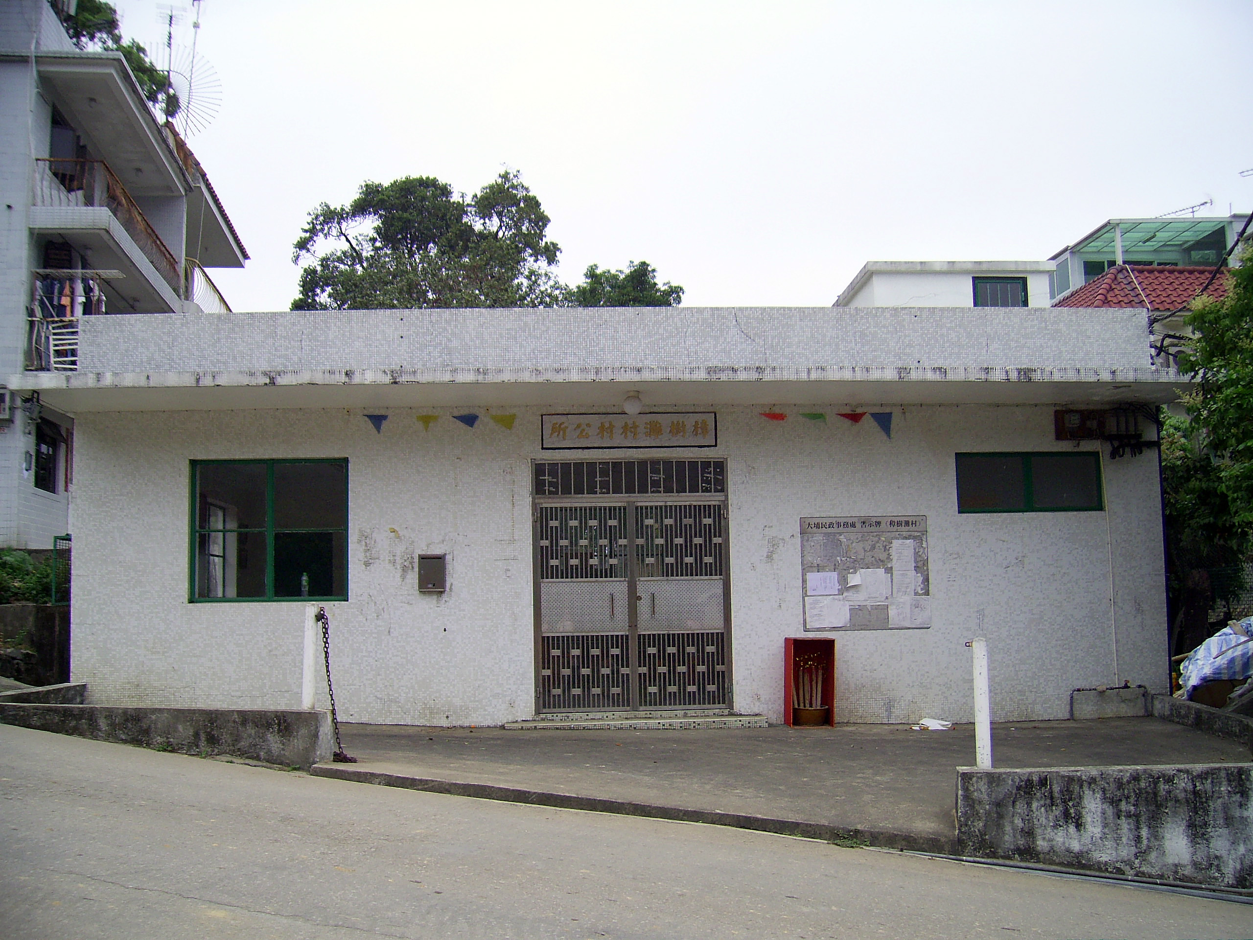 中文（香港）: 樟樹灘村村公所